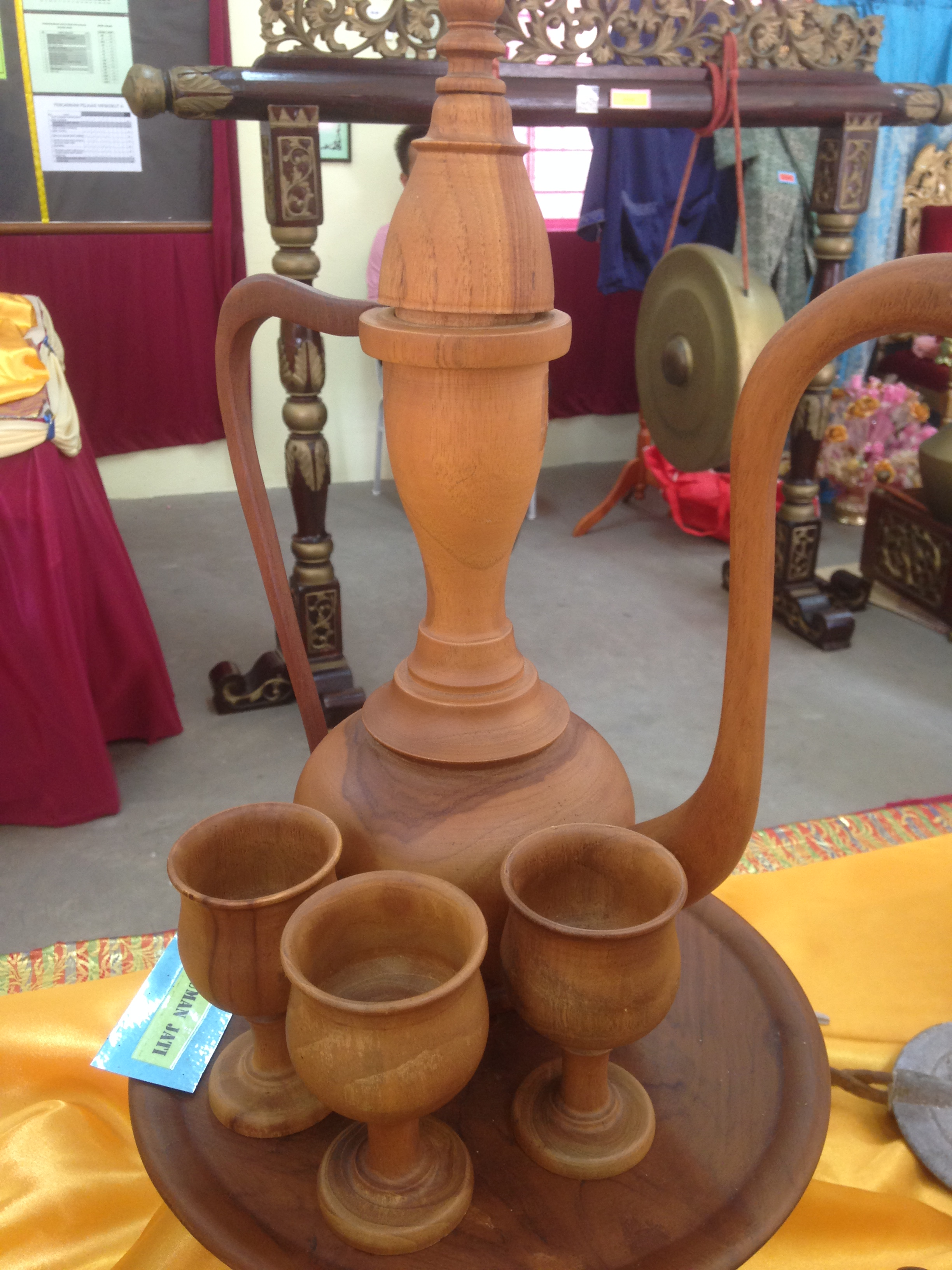 SET MINUMAN